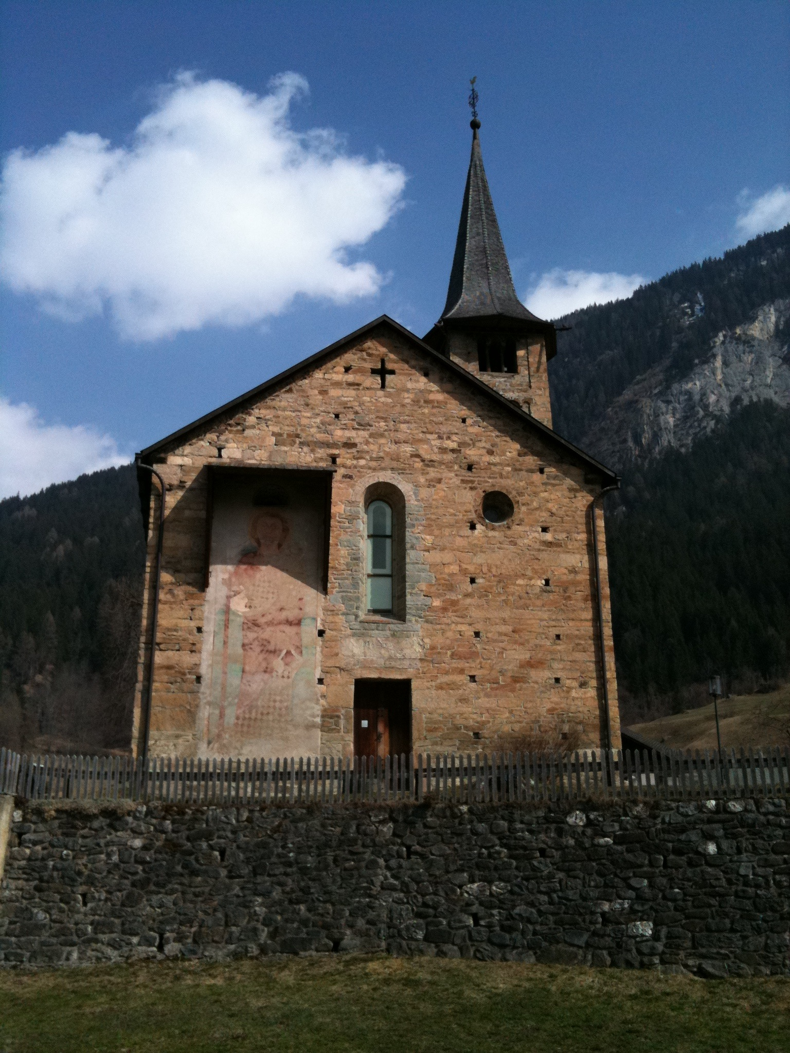 reformierte St.Martin-Kirche Zillis (Kanton Graubünden), Aussenansicht mit Christopherus-Motiv